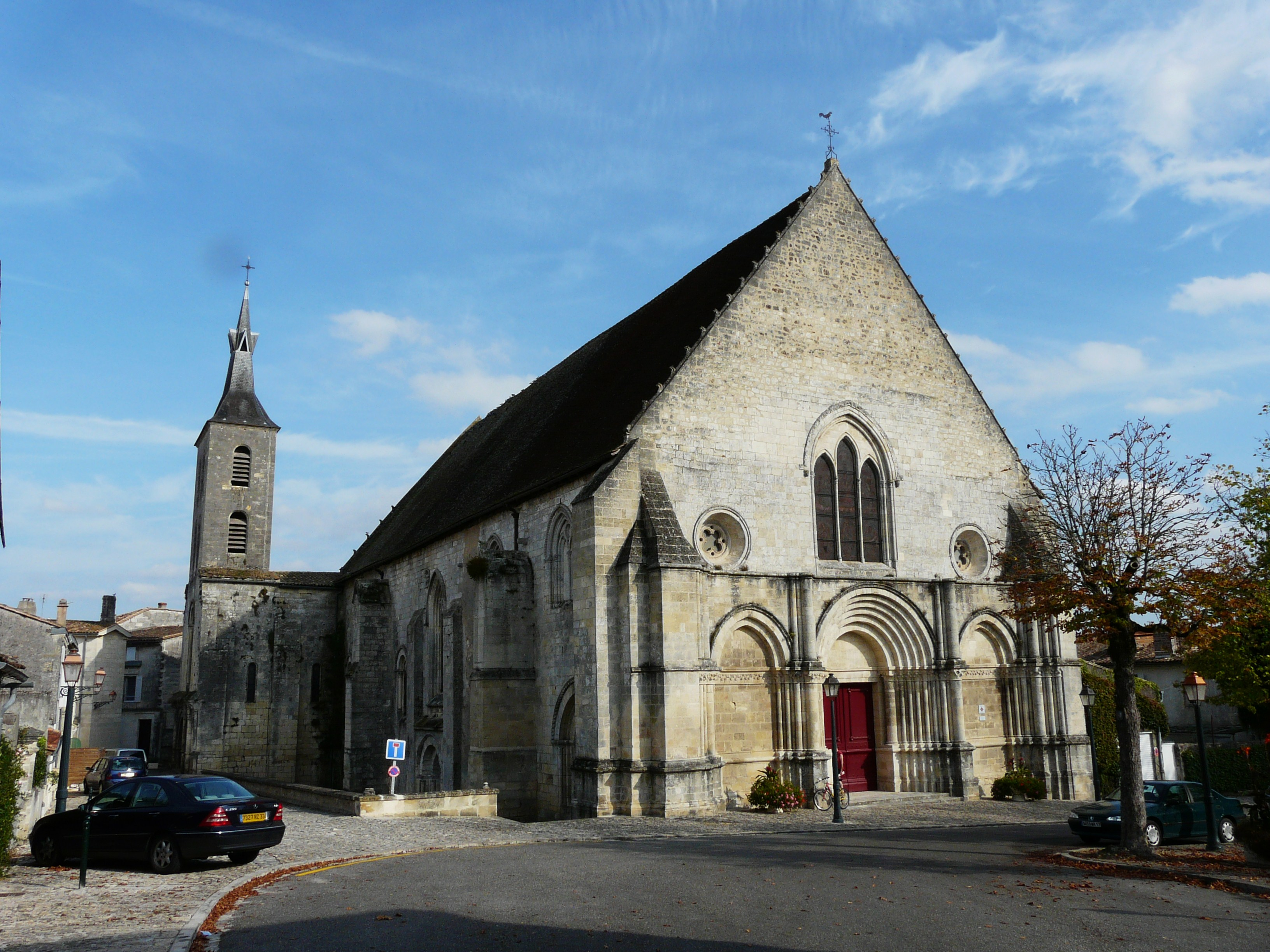 L'abbatiale Notre-Dame, Guîtres, Gironde, France